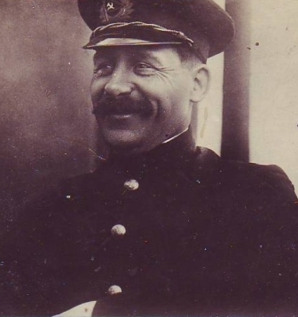 Воро́нин Влади́мир Ива́нович — капитан парохода Челюскин. Впоследствии — капитан советского ледокольного флота, полярный исследователь, участник многих советских экспедиций в Арктике. Изображение на почтовой карточке Герои Арктики. В.И.Воронин - капитан "Челюскина". Изд. Союзфото, Москва. 1934 год.